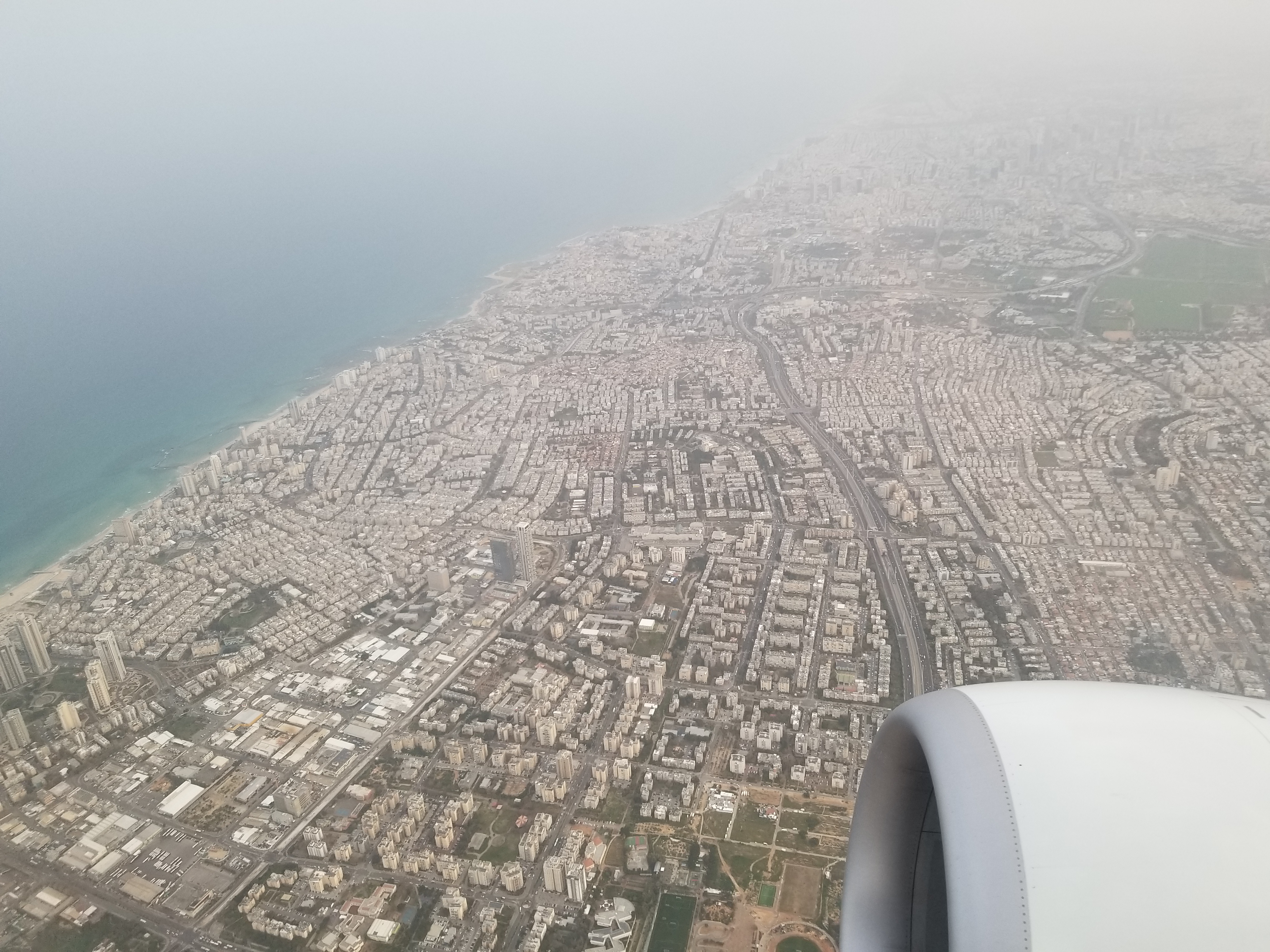 בת ים בצילום מהאוויר